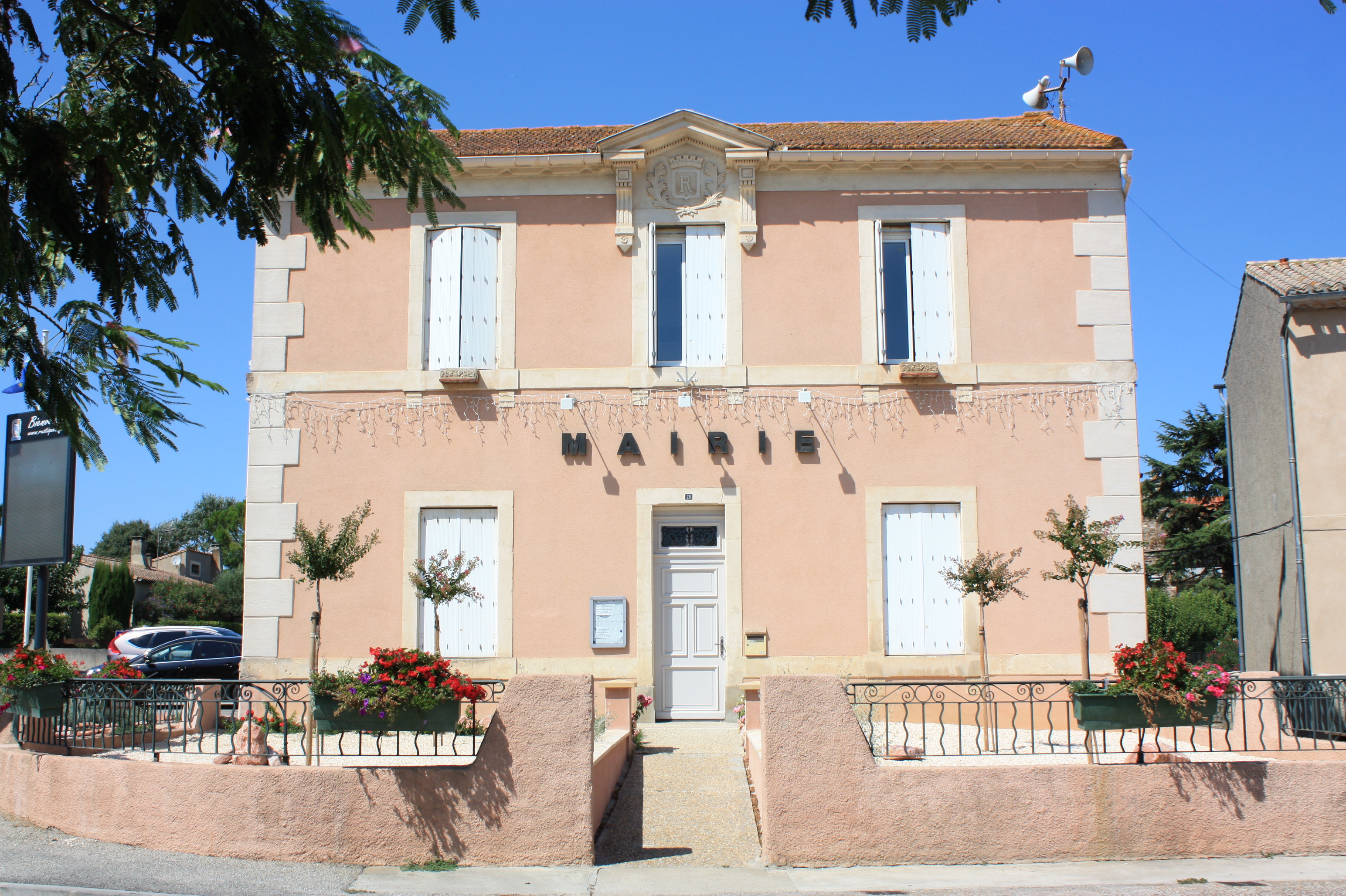 Mairie de Rustiques